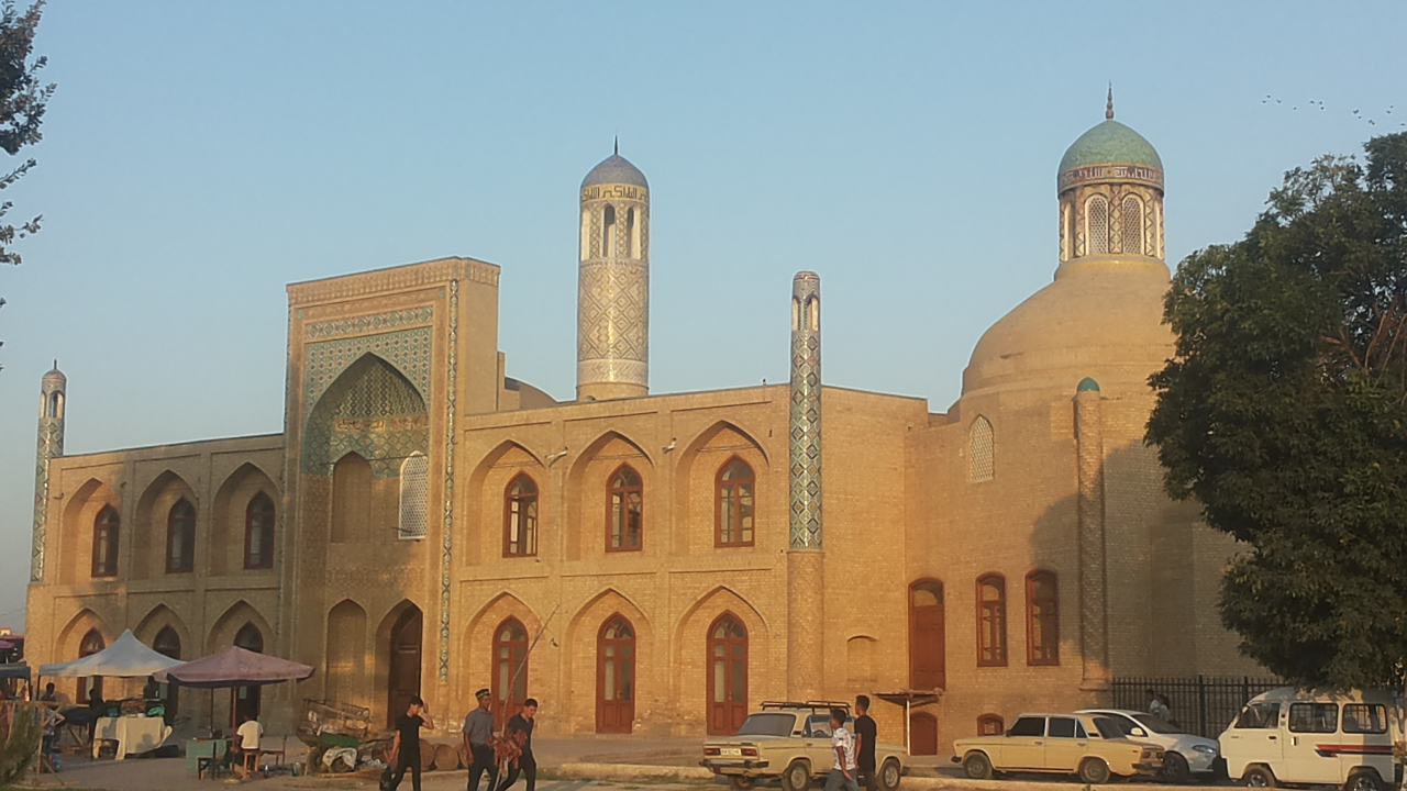 Moellah Kirgiz-madrassa Namangan Oezbekistan